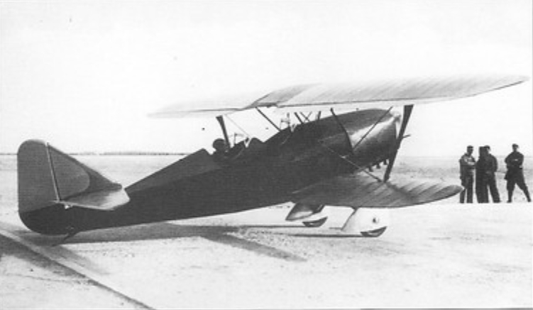 Adaro 1.E7 Chirta, španělské cvičné letadlo